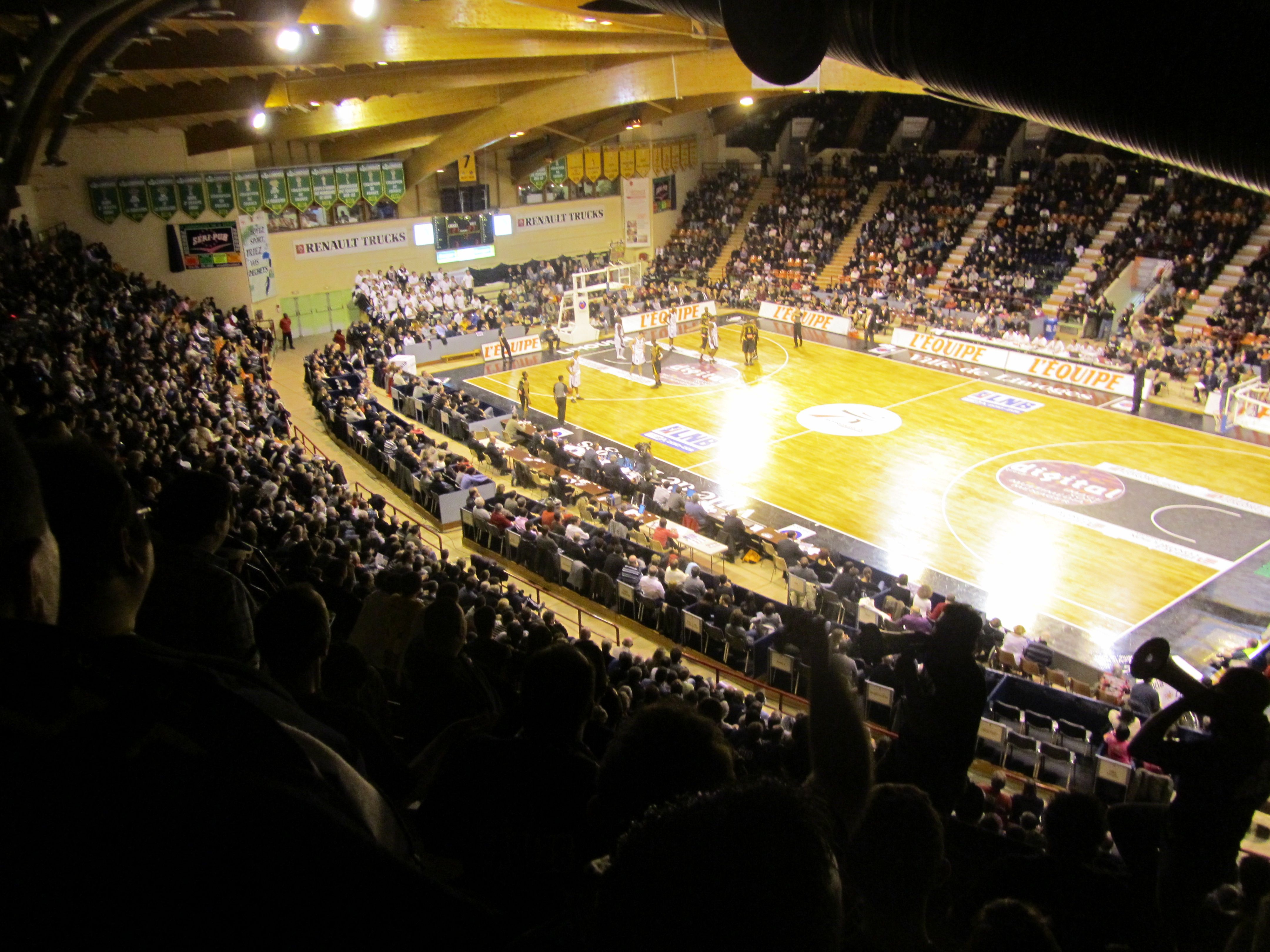 Le public de Beaublanc au club français de basket-ball Limoges CSP, photo prise dans la Gate 15 des Eagles.